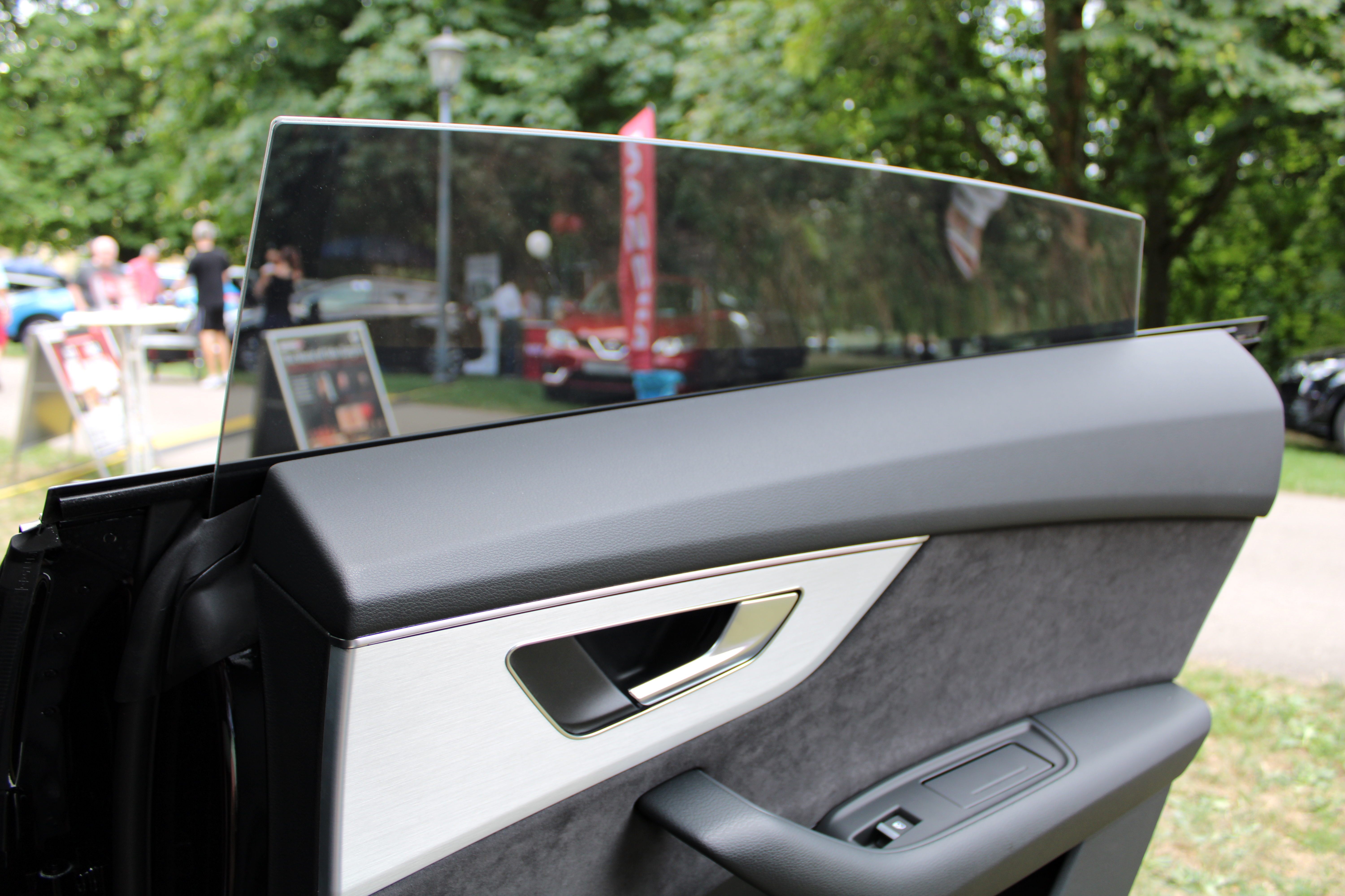 Audi Q8 at schloss Monrepos - window